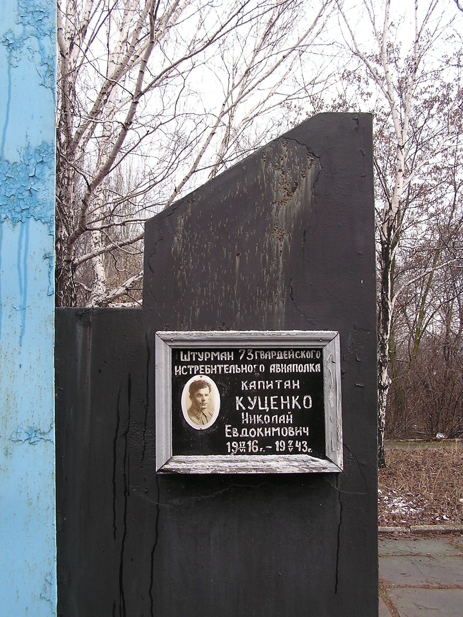 Донецк. Памятник куценко